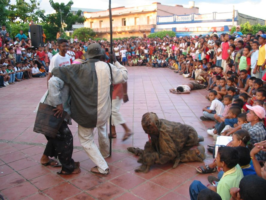 Actores en medio de la Matanza del Tigre.